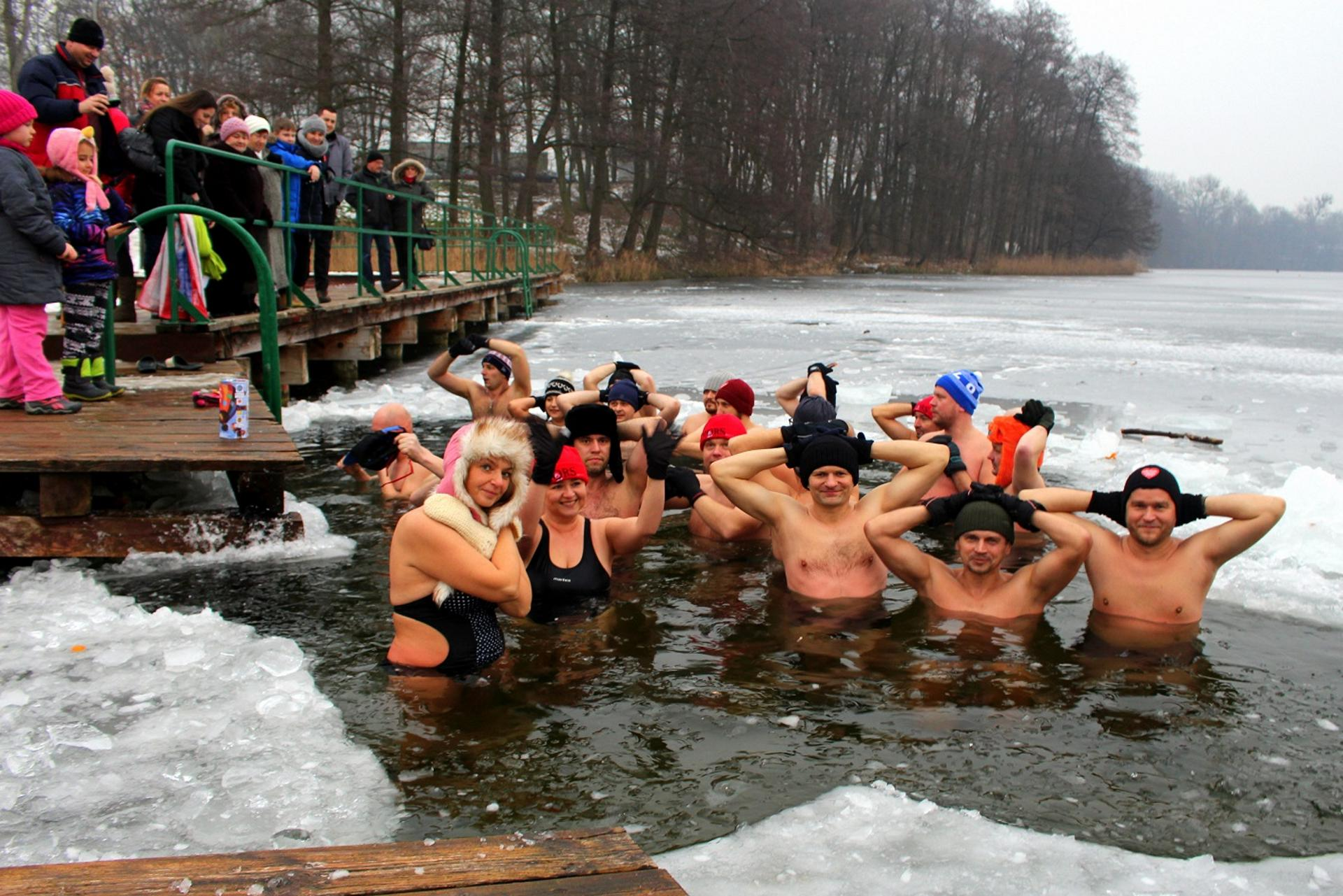 Zimowa kąpiel w jeziorze Kłodawskim